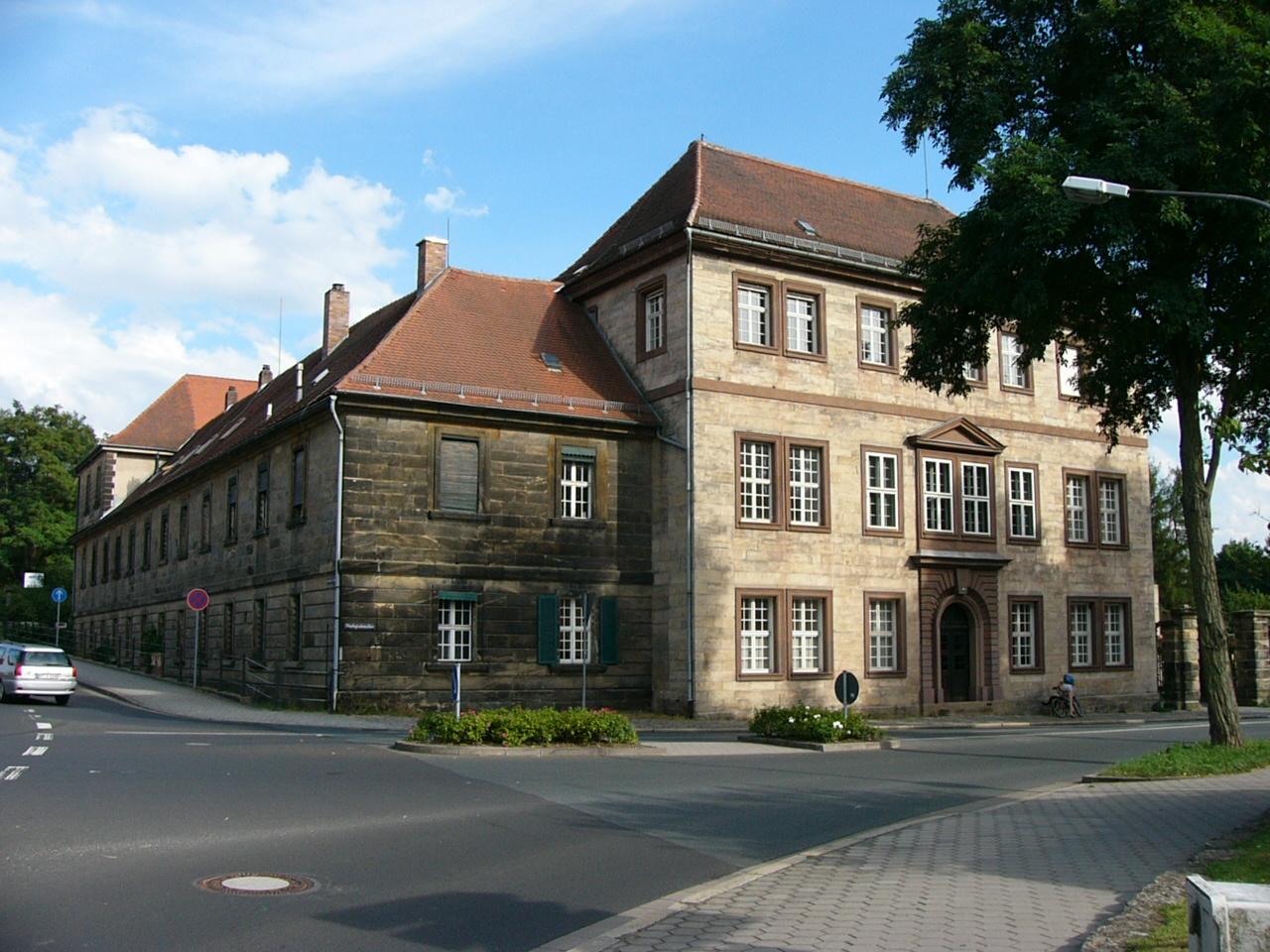 Bayreuth, Prinzessinnenhaus, St. Georgen, Markgrafenallee 44